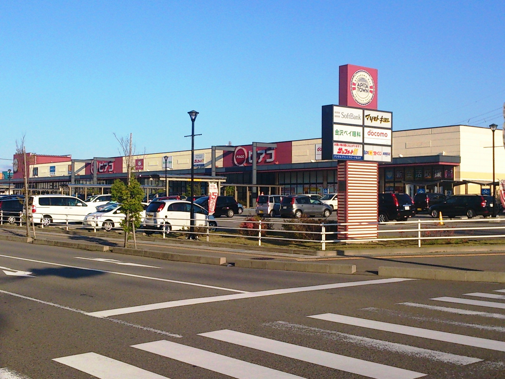 ピアゴ金沢ベイ店（シンセン・ポート）